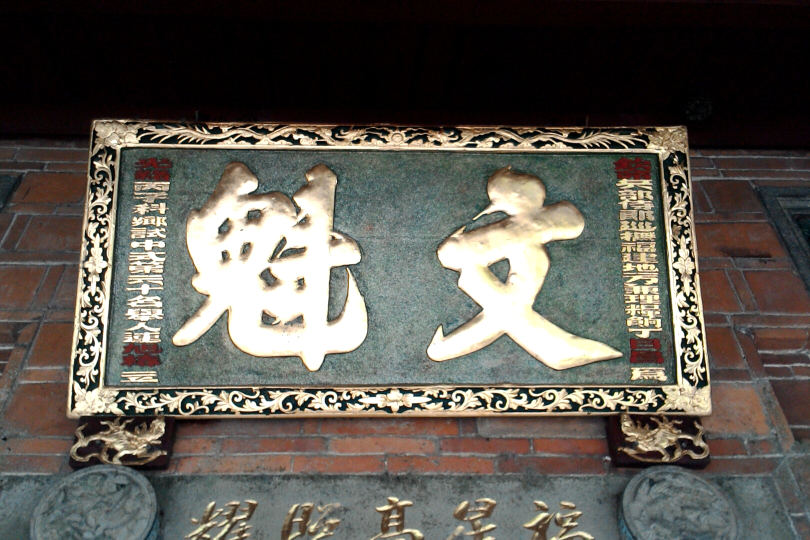 連舉人厝中丁日昌所贈匾額,新北市雙溪區平林里